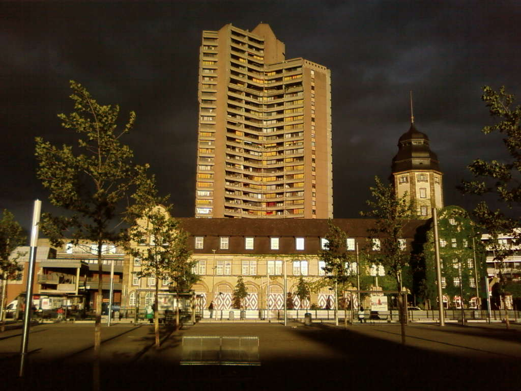 Die alte Feuerwache Mannheim, Brückenstraße 2, 68167 Mannheim. Seitenansicht, man sieht auf die Tore der Halle. Fotografiert vom gerade fertiggestellten alten Messplatz.